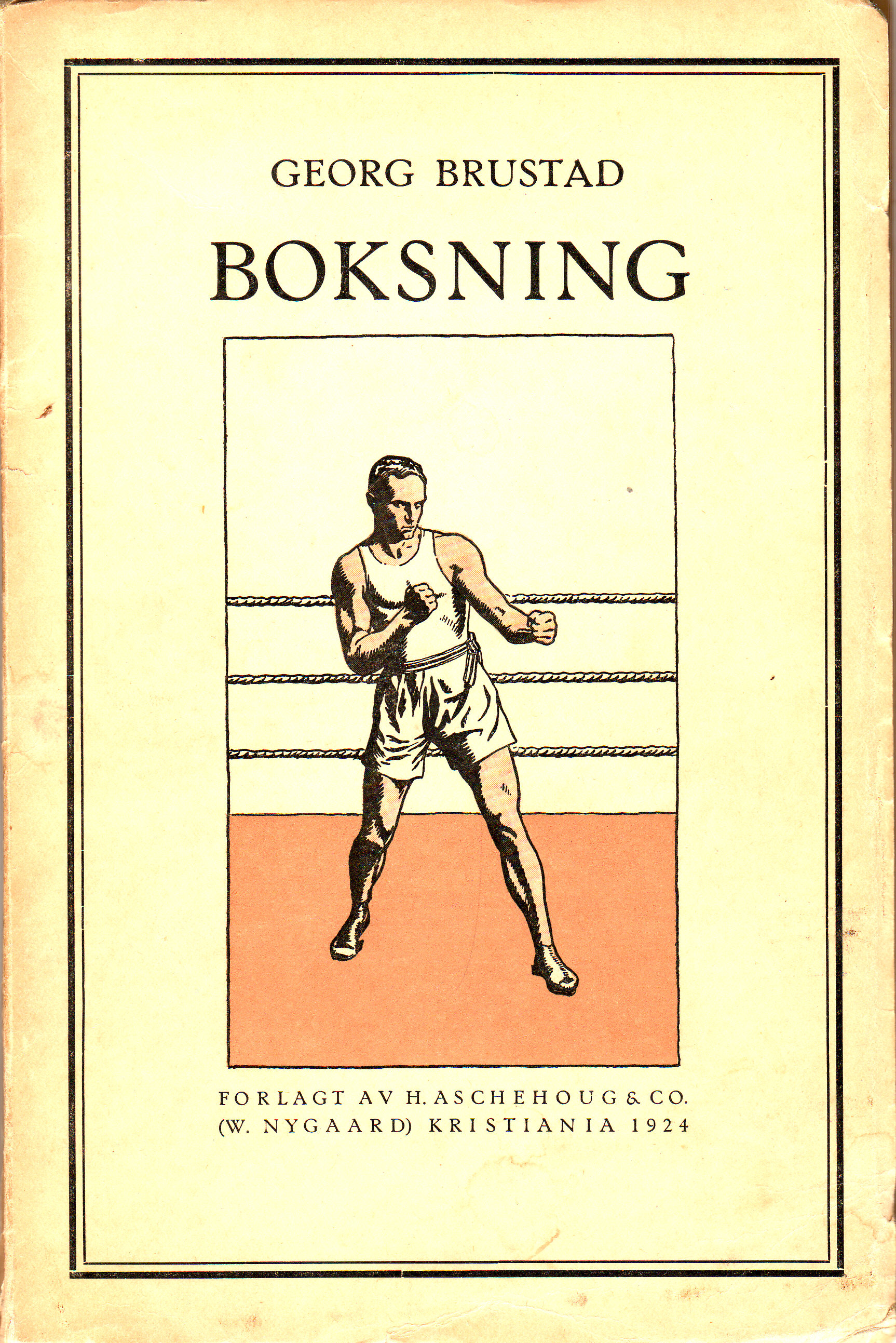 Forside til boka Boksning